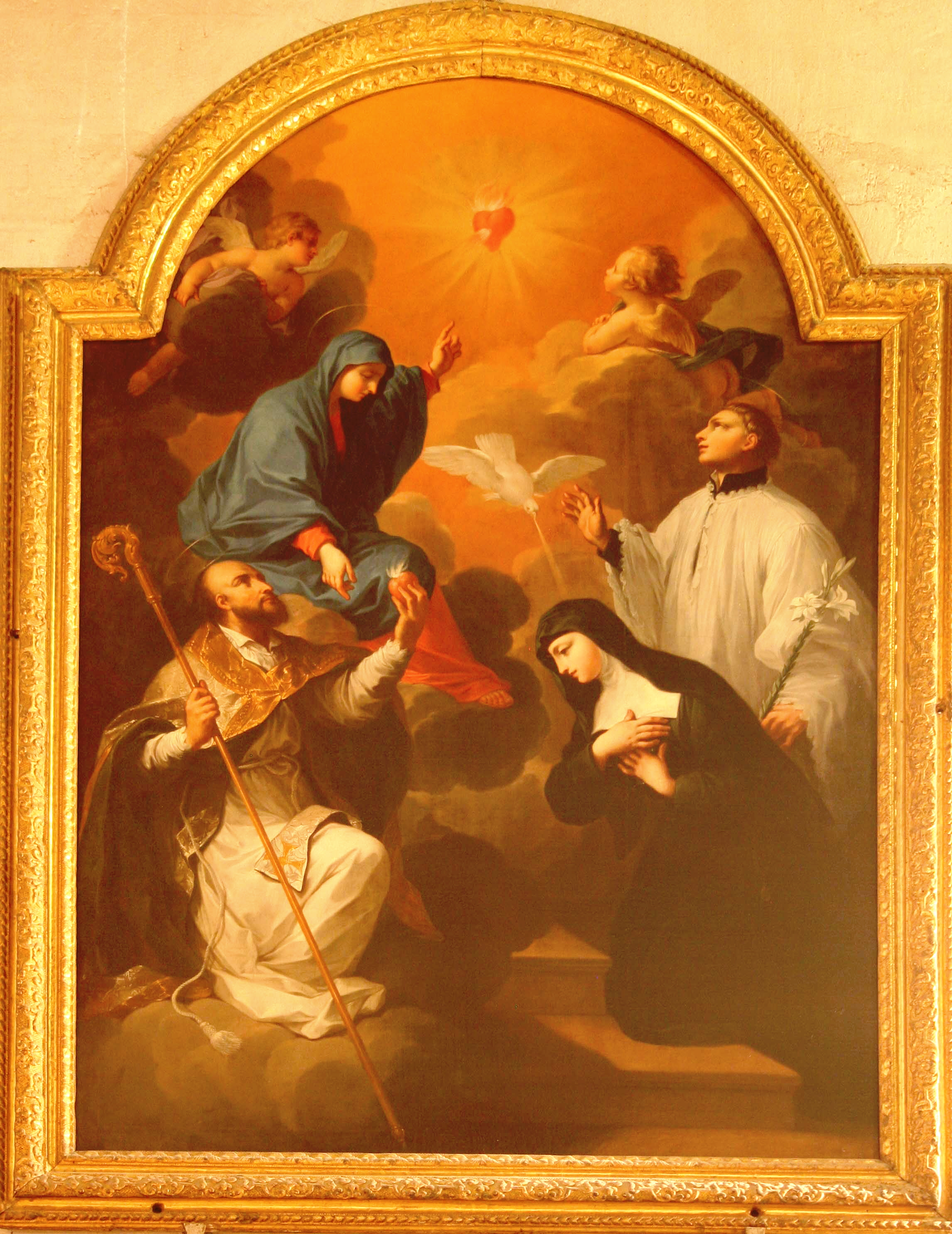 Tableau représentant sainte Jeanne de Chantal et saint François de Sales offrant leur coeur à la Vierge dans la cathédrale Saint-Siffrein de Carpentras (Vaucluse).